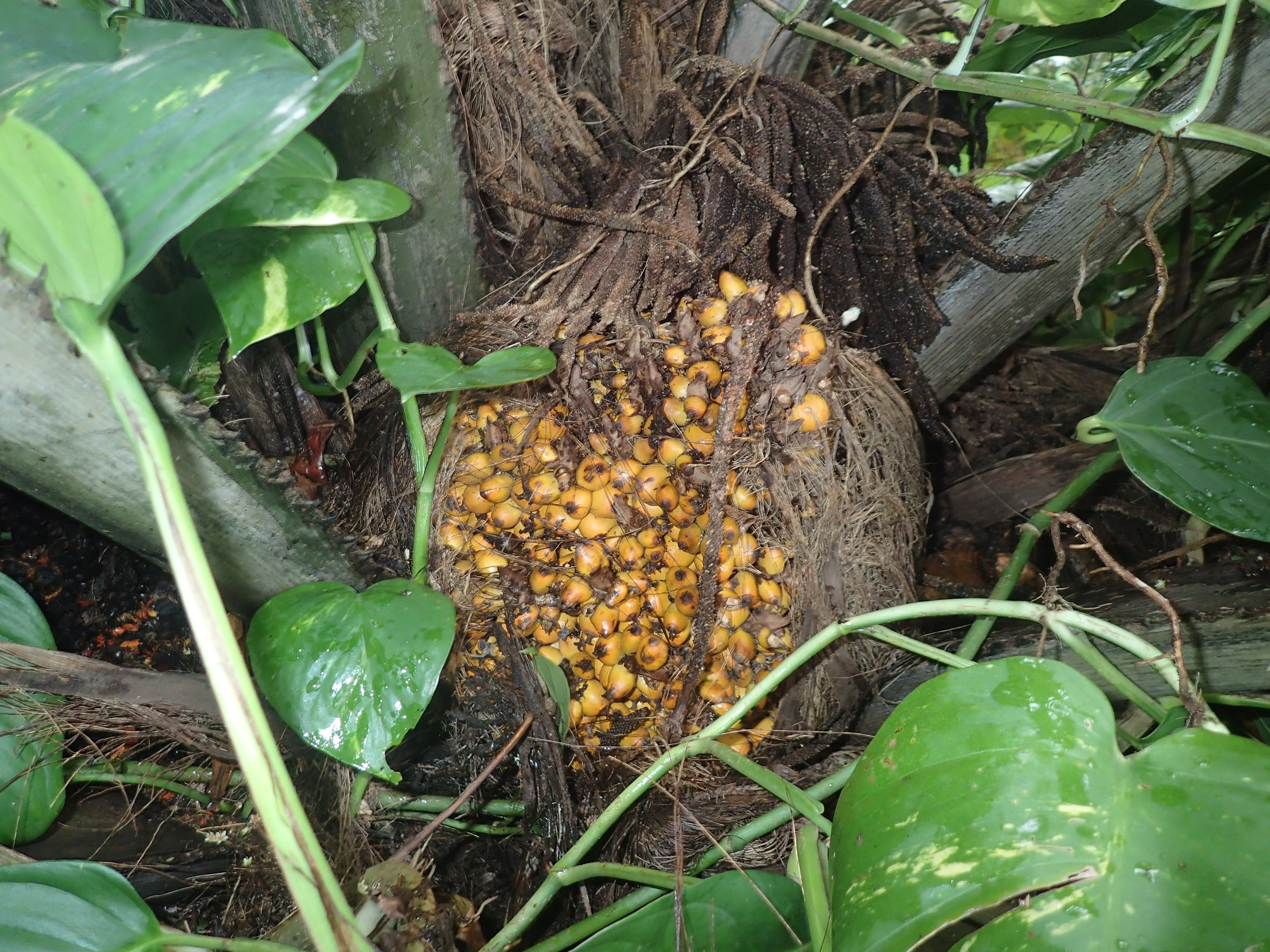 Grappe de jeunes fruits de palmier à huile américain En culture dans un jardin à Cayenne.